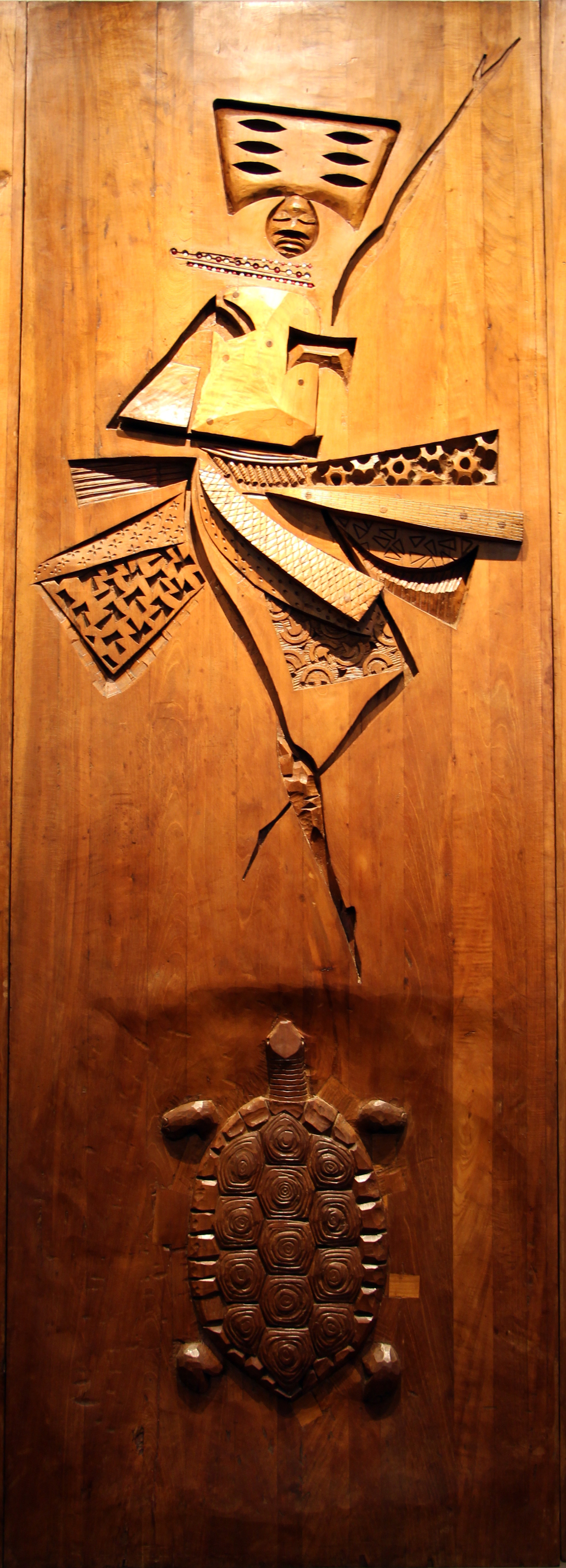 Candomblé nel Museu Afro-Brasileiro, Salvador